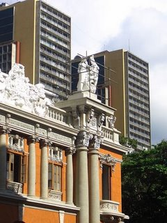 Nacional